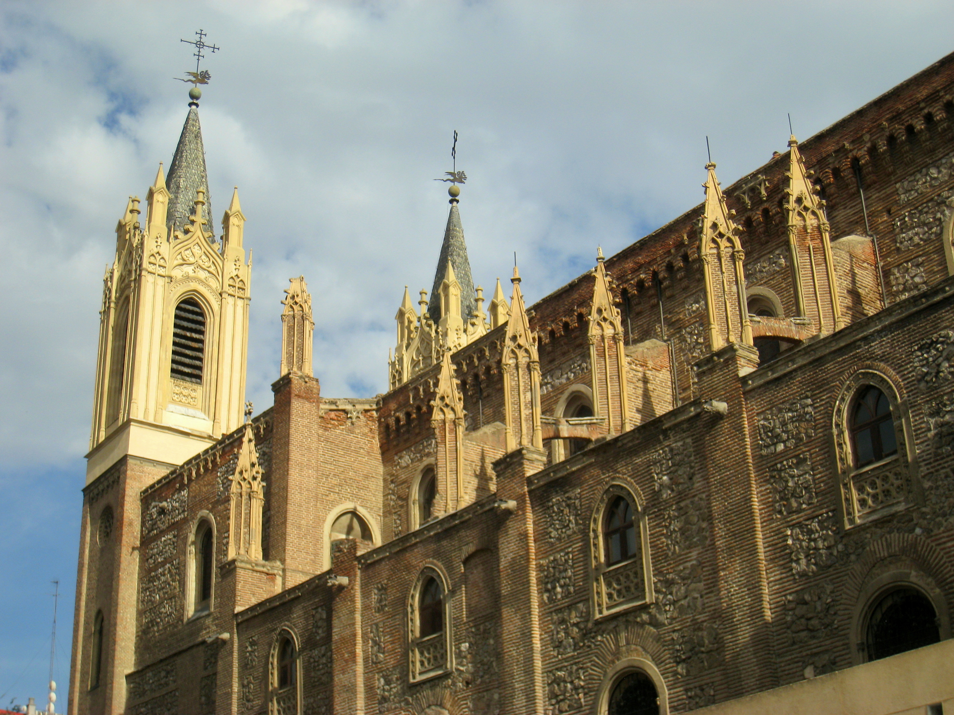 Iglesia Parroquial de San Jerónimo el Real (also known as the Iglesia de Los Jeronimos or Monasterio de Jerónimos), Madrid, Spain.